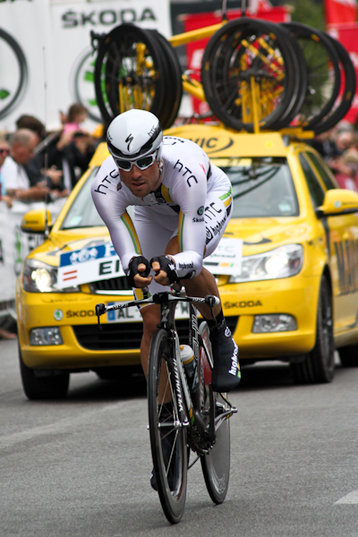 Bernhard Eisel au départ